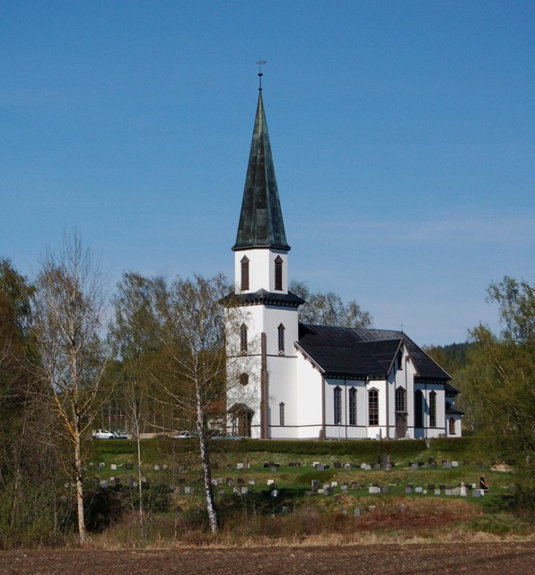 Sand kirke